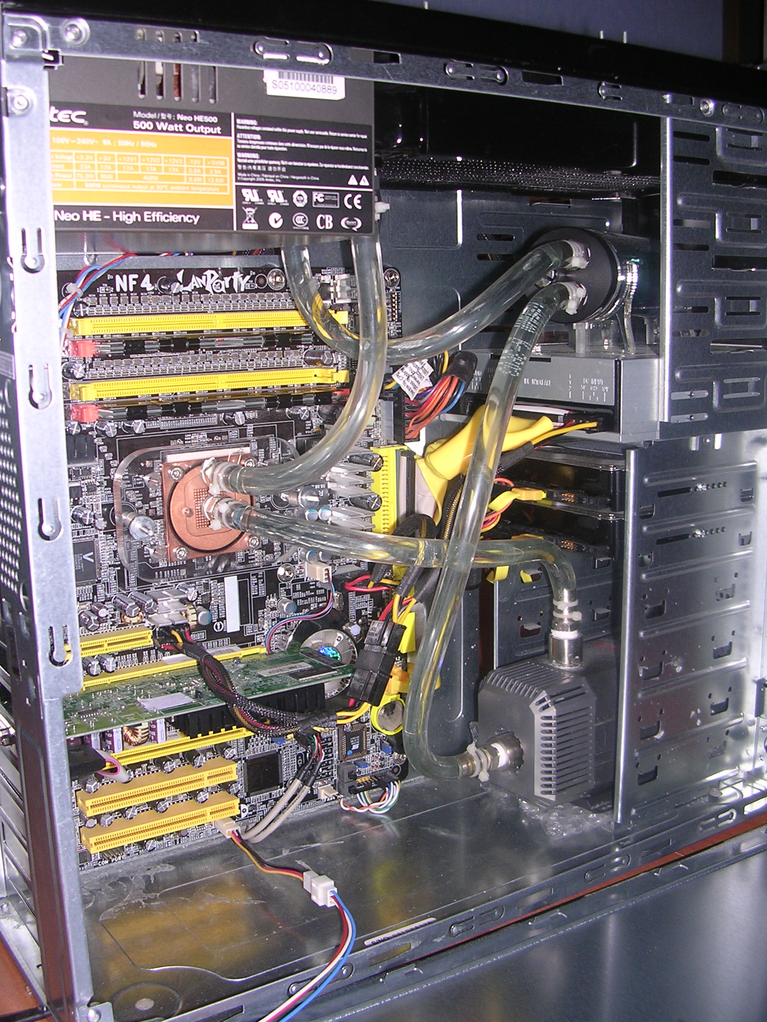 Un Watercooling monté et fonctionnel.